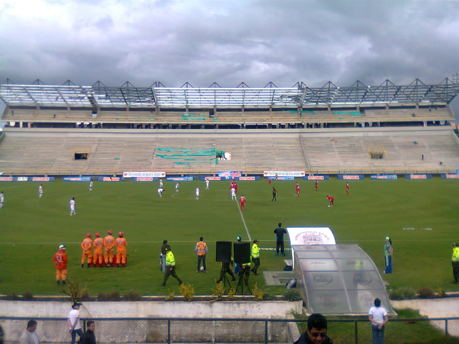 Partido jugado en 2011 entre Patriotas y Academia